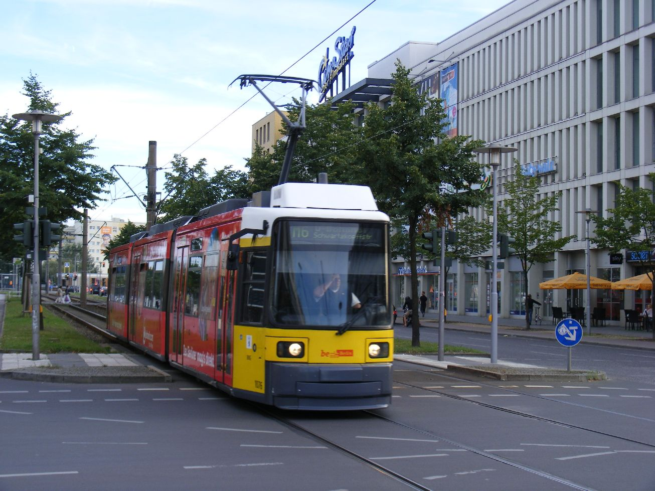 Berlin Hellersdorf Tram Route M6